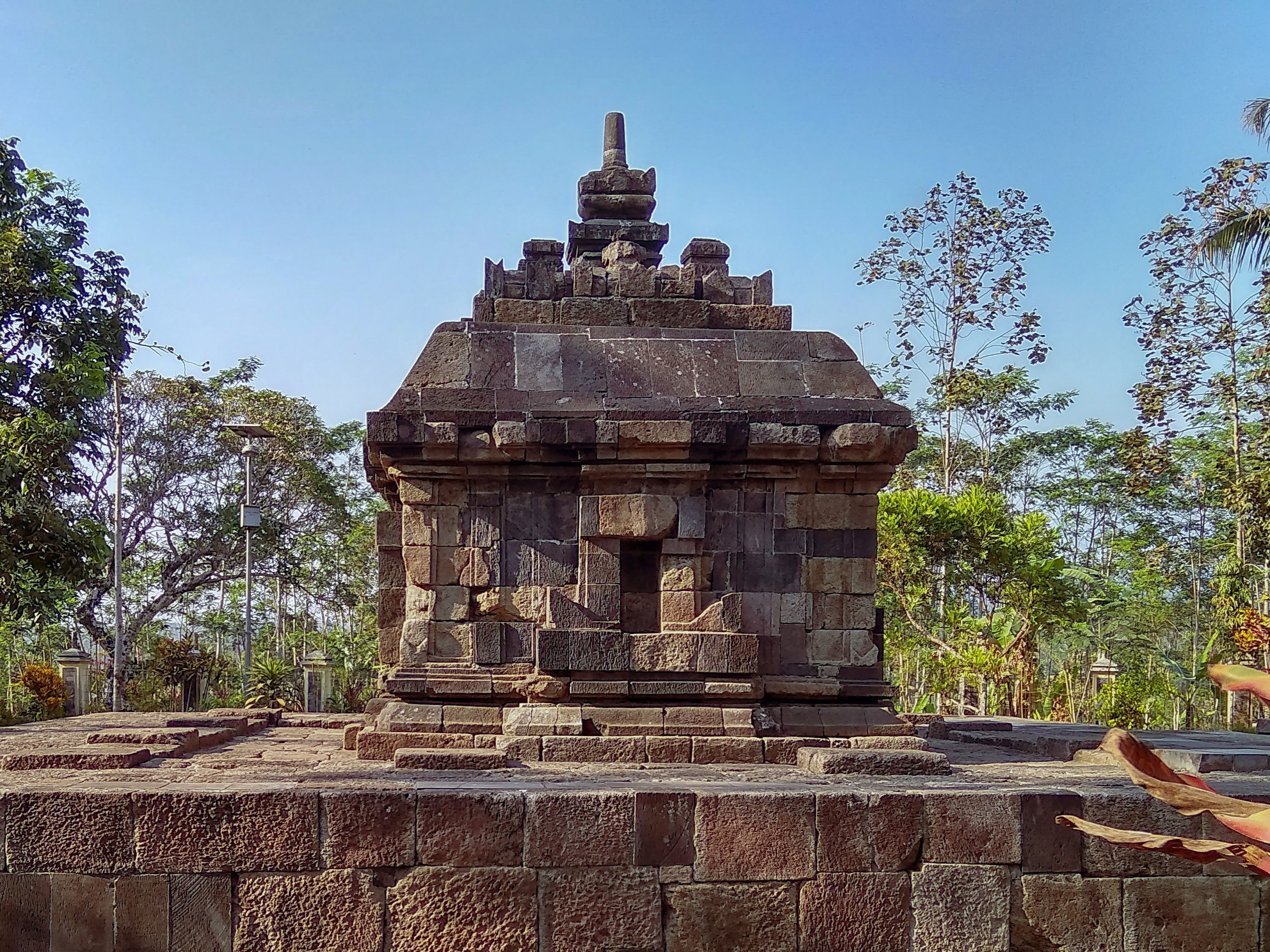 Candi Klero atau Candi Tengaran adalah candi bercorak Hindu yang terletak di Desa Ngentak Lor, Kelurahan Klero, Kecamatan Tengaran, Kabupaten Semarang, Provinsi Jawa Tengah.